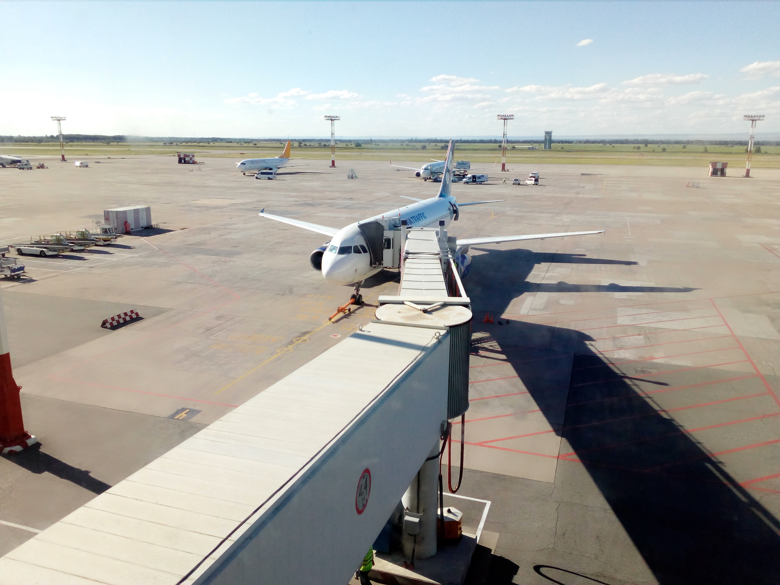 Airbus A 320 EX-32005